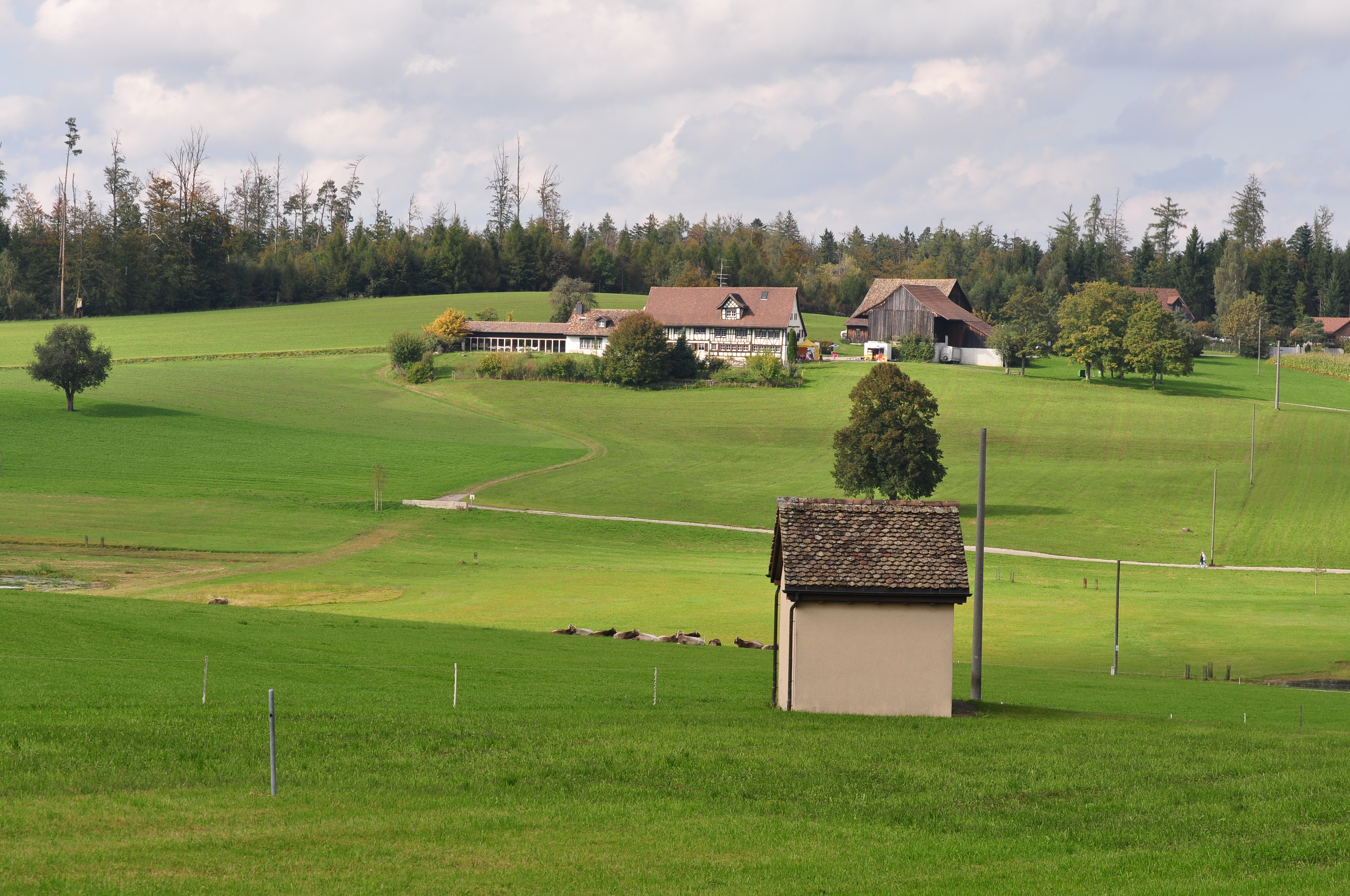 On Pfannenstiel Guldenen (Switzerland)